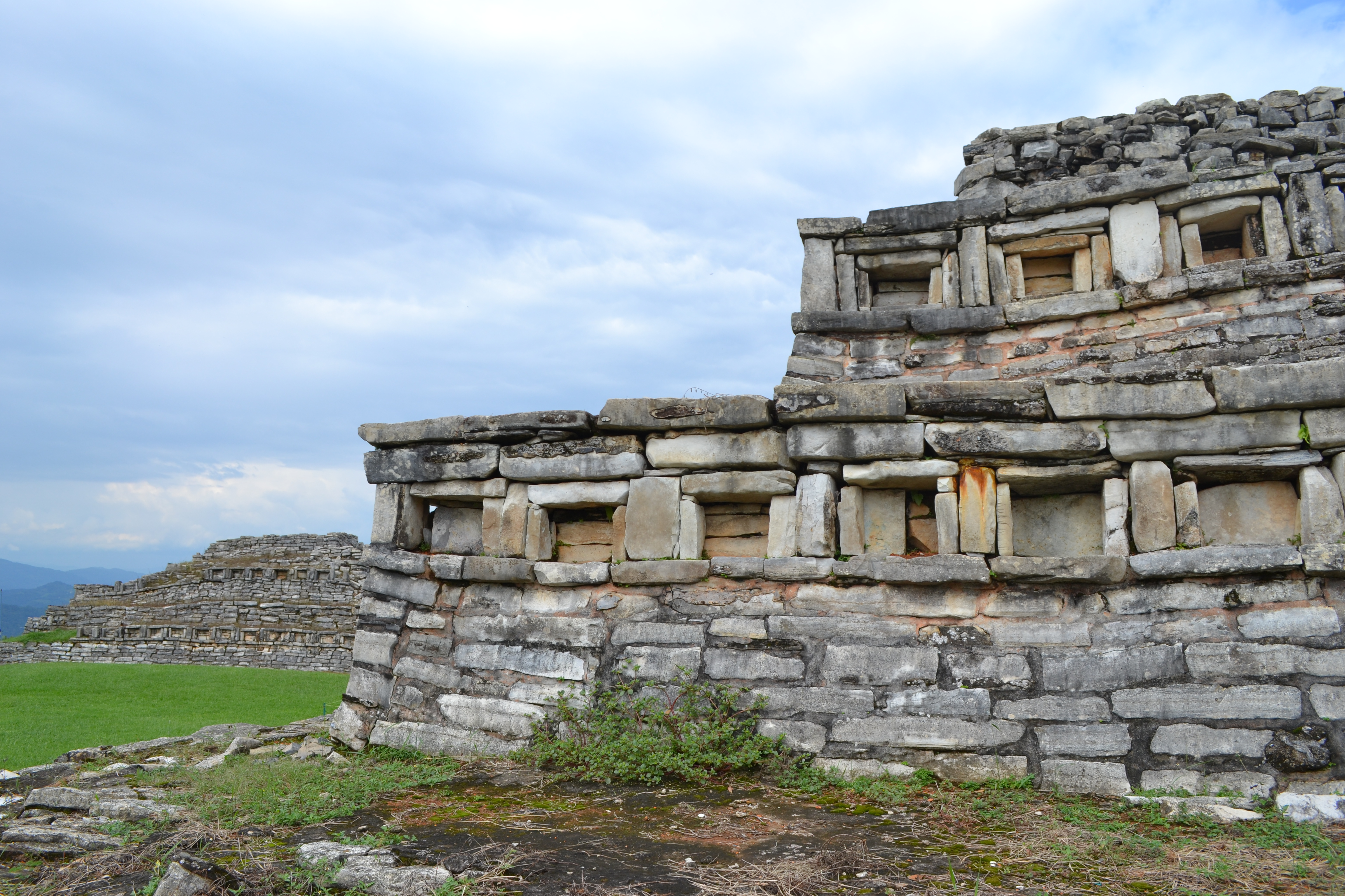 Sitio de Yohualichan